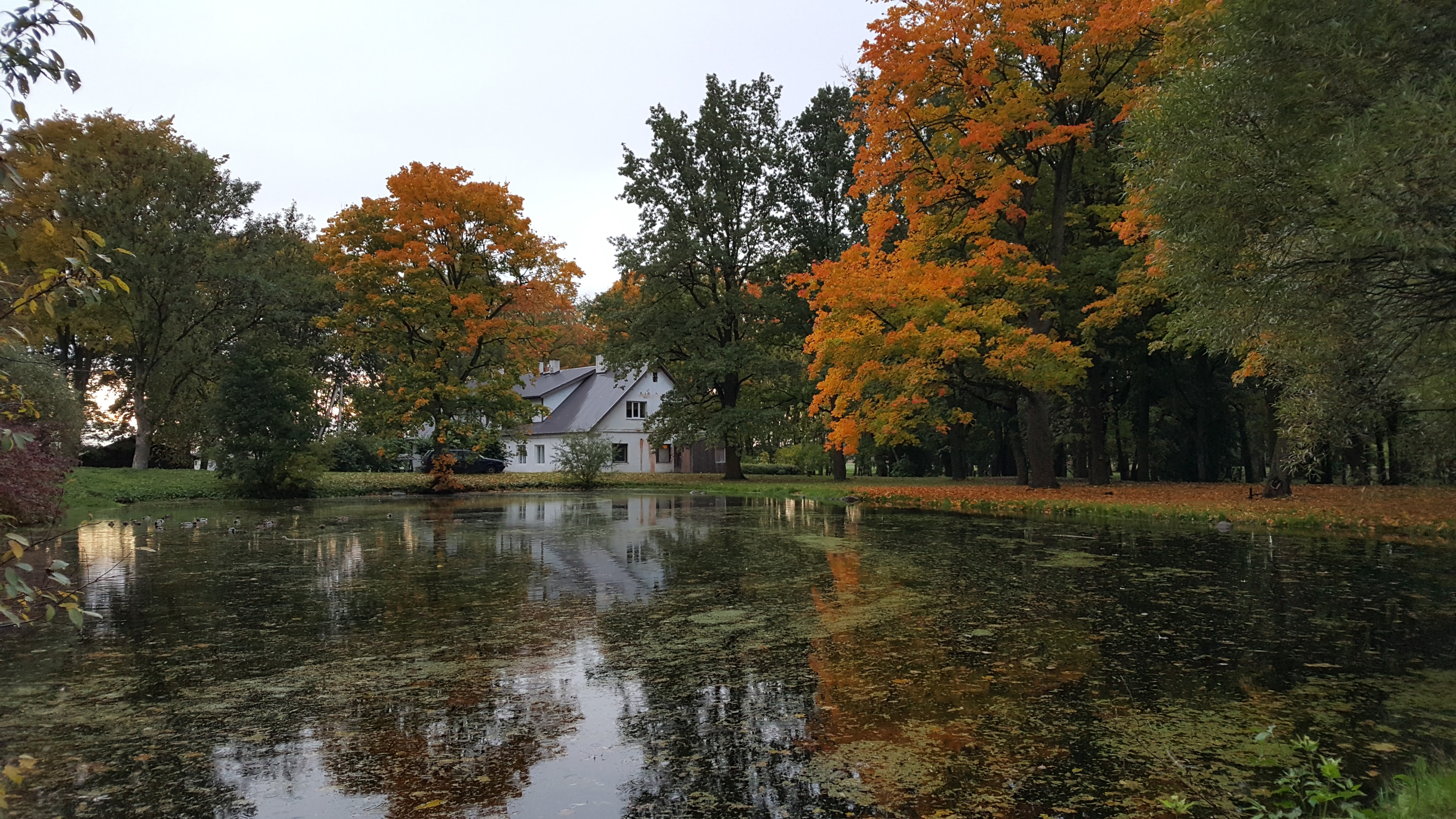 Vorbuse mõisasüda